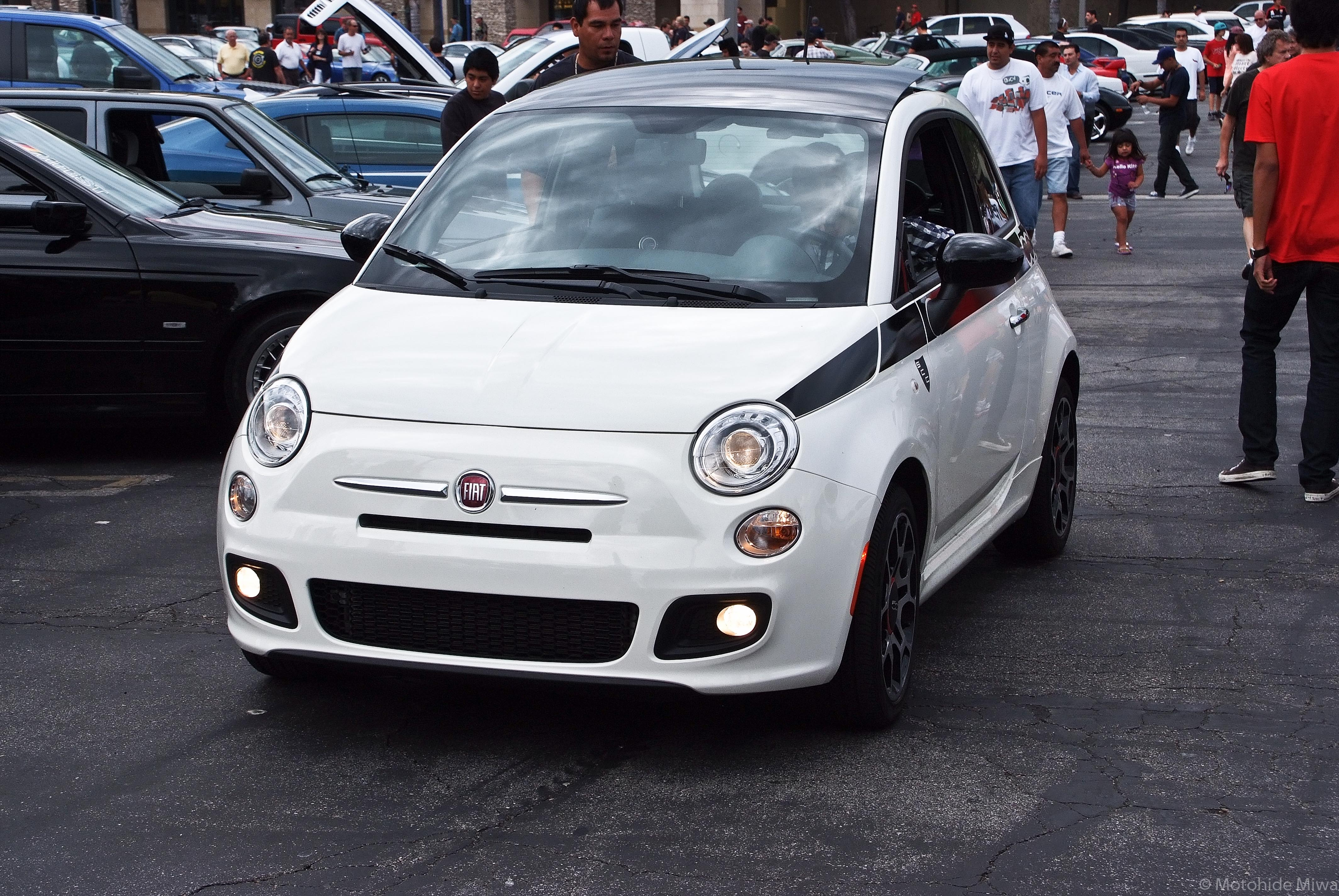 SupercarSunday-249